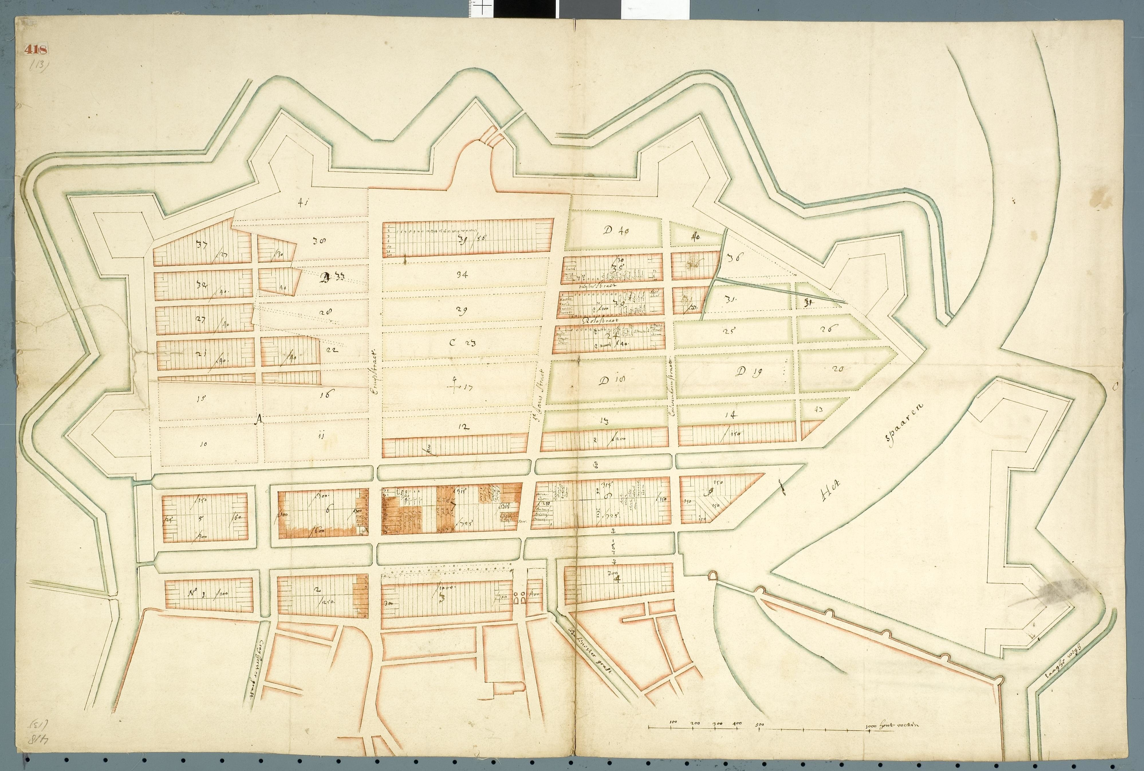 Toeschrijving aan Den Otter en datering ontleend aan: In 't land van belofte : in de nieuwe stadt : ideaal en werkelijkheid van de stadsuitleg in de Republiek 1580-1680 / door Ed Taverne, blz.380. - schaal van 1000 houtvoeten = 14,2 cm. - Afgebeeld is het nieuwe stratenpatroon in de Nieuwe Uitleg met waarschijnlijk aangegeven welke percelen verkocht zijn. - Oriëntatie: noorden linksboven. - Inventarisnummer: 51-000418*1